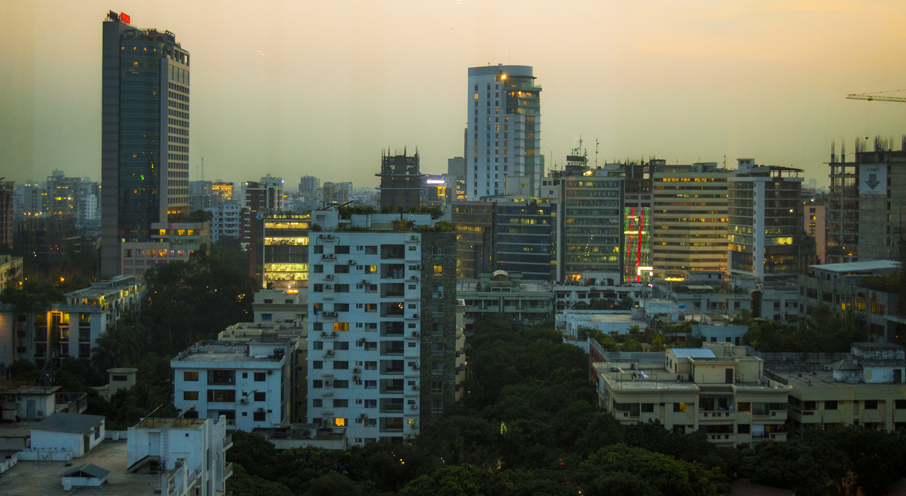 Gulshan Skyline